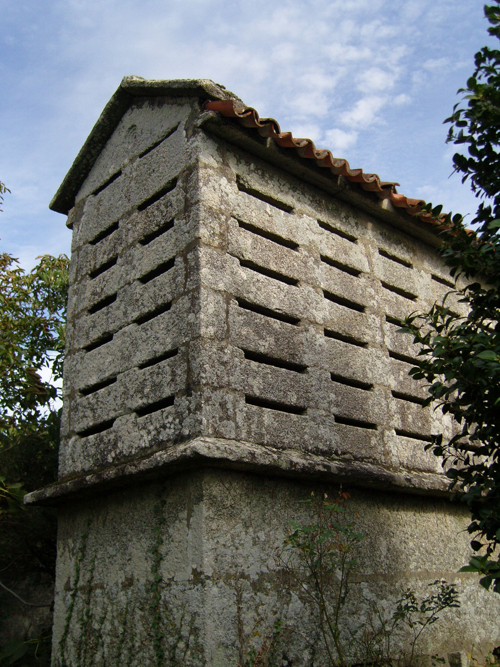 Hórreo con paneira de pedra en Comoxo, Boiro